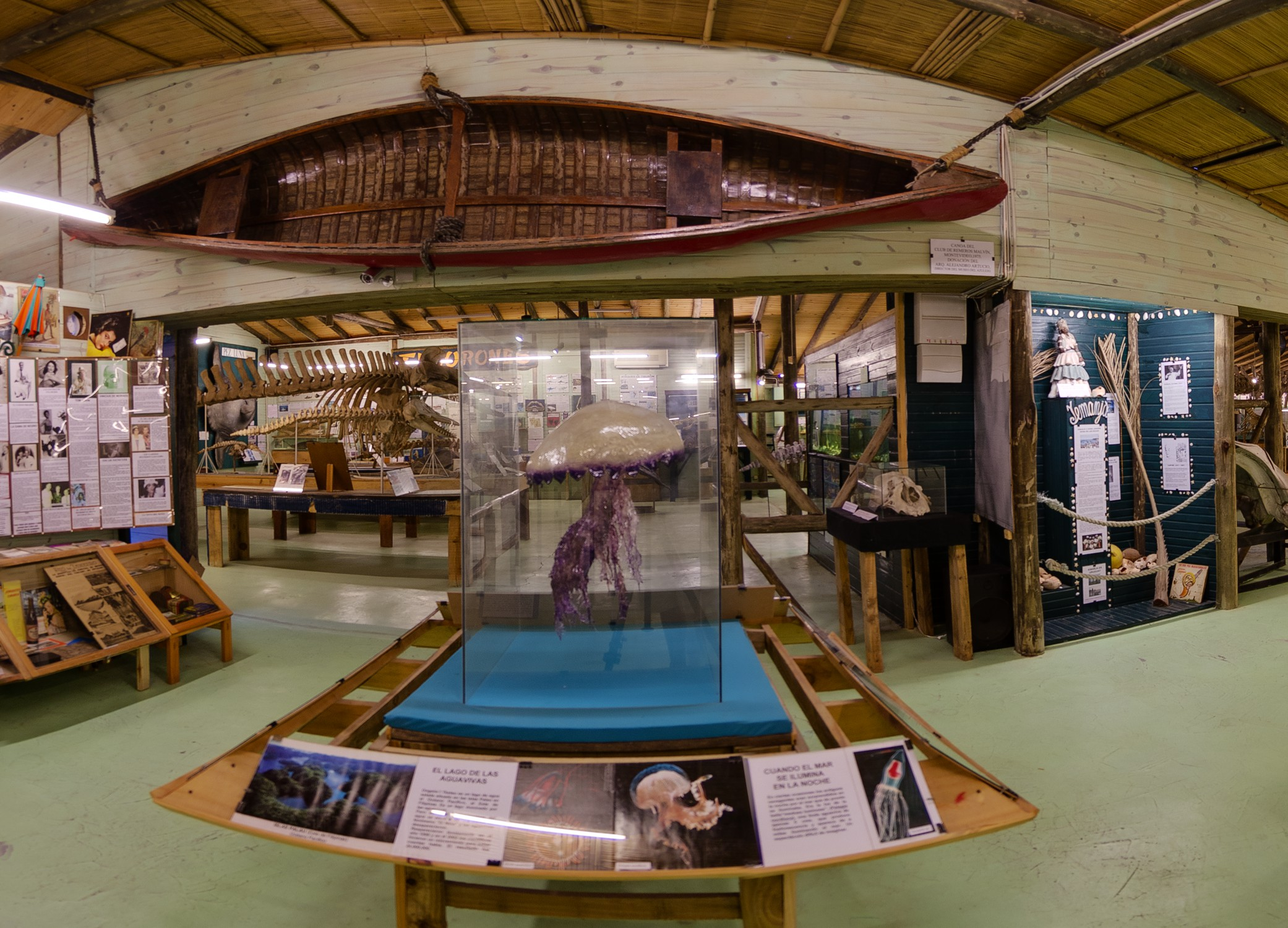 Museo del Mar, sala principal